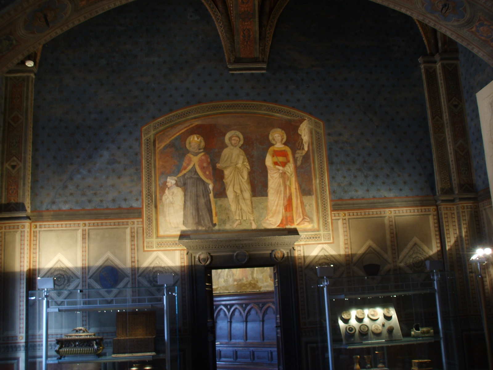 Palazzo Pubblico a Siena, Italy. Affresco.